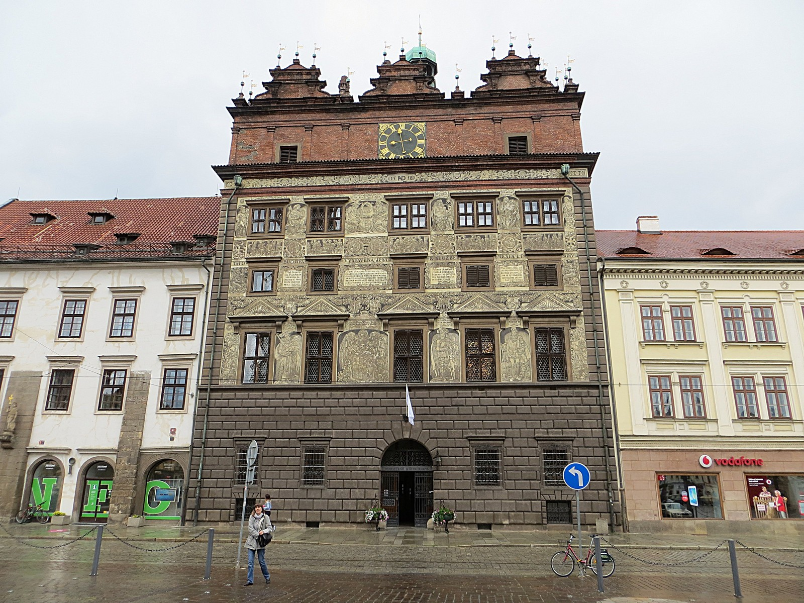 Magistrát města Plzně